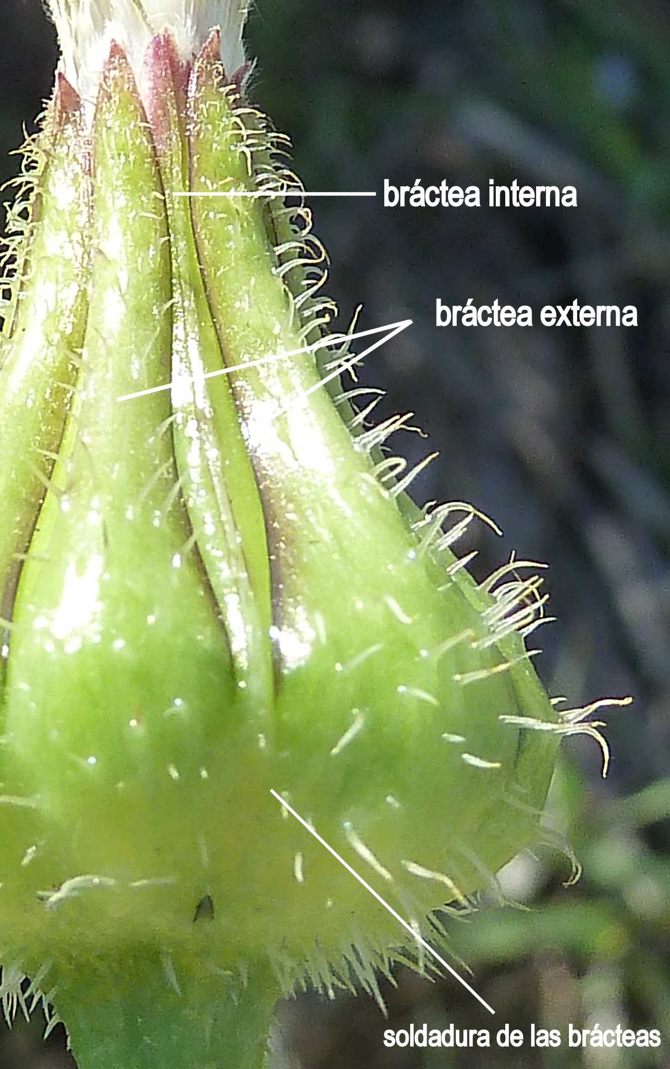 Urospermum picroides - Detalle de las 2 filas de brácteas involucrales soldadas, la externa híspida. - circa rotonda salida Albatera hacía San Isidro (CV-990), Albatera (Alicante, España).